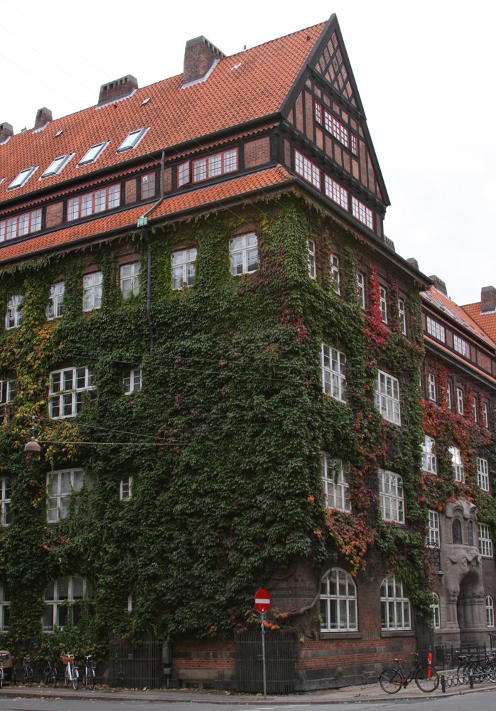 The building of Københavns Belysningsvæsen at the corner of Vognmagergade (with the gable) and Lønporten in Copenhagen, Denmark